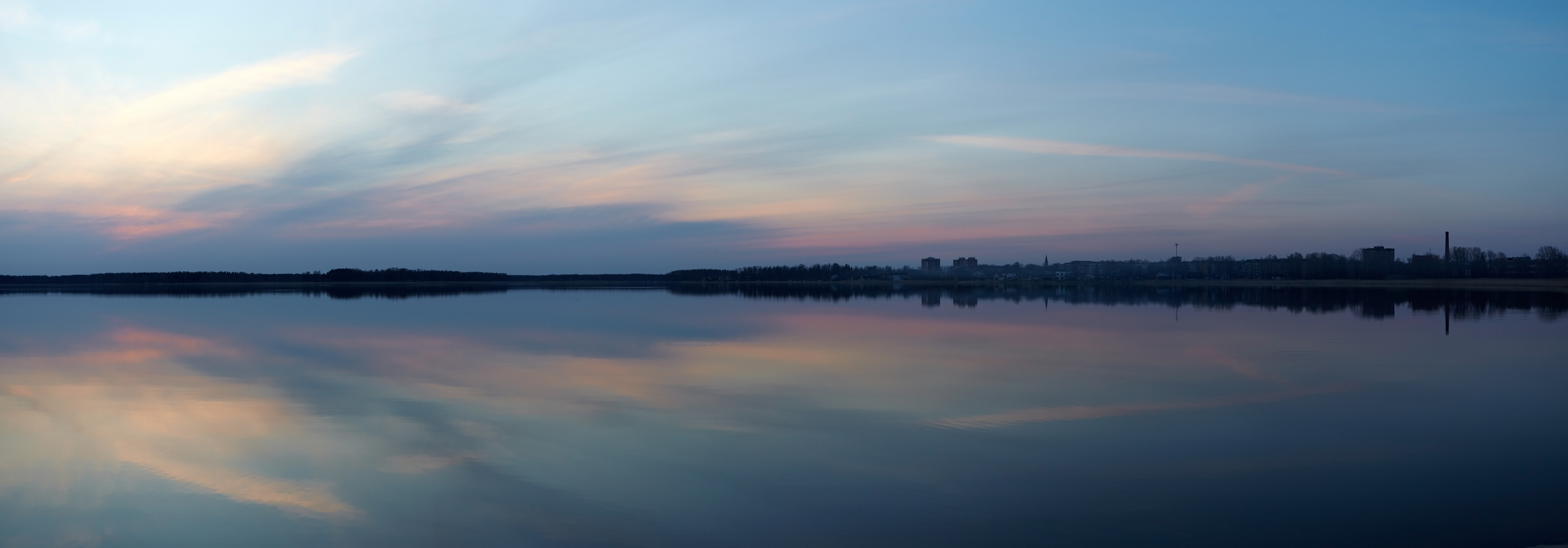 Tamula järv 2012. aasta aprillis (panoraam mitmest fotost). Paremal paistab Võru linn.